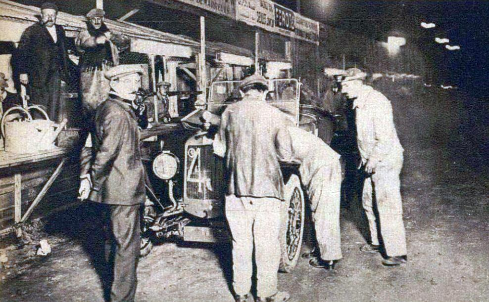 Ravitaillement nocturne aux 24 heures du Mans 1924 de la Majola 1,1 L de Follot et Casellini, avant son abandon (n°49).